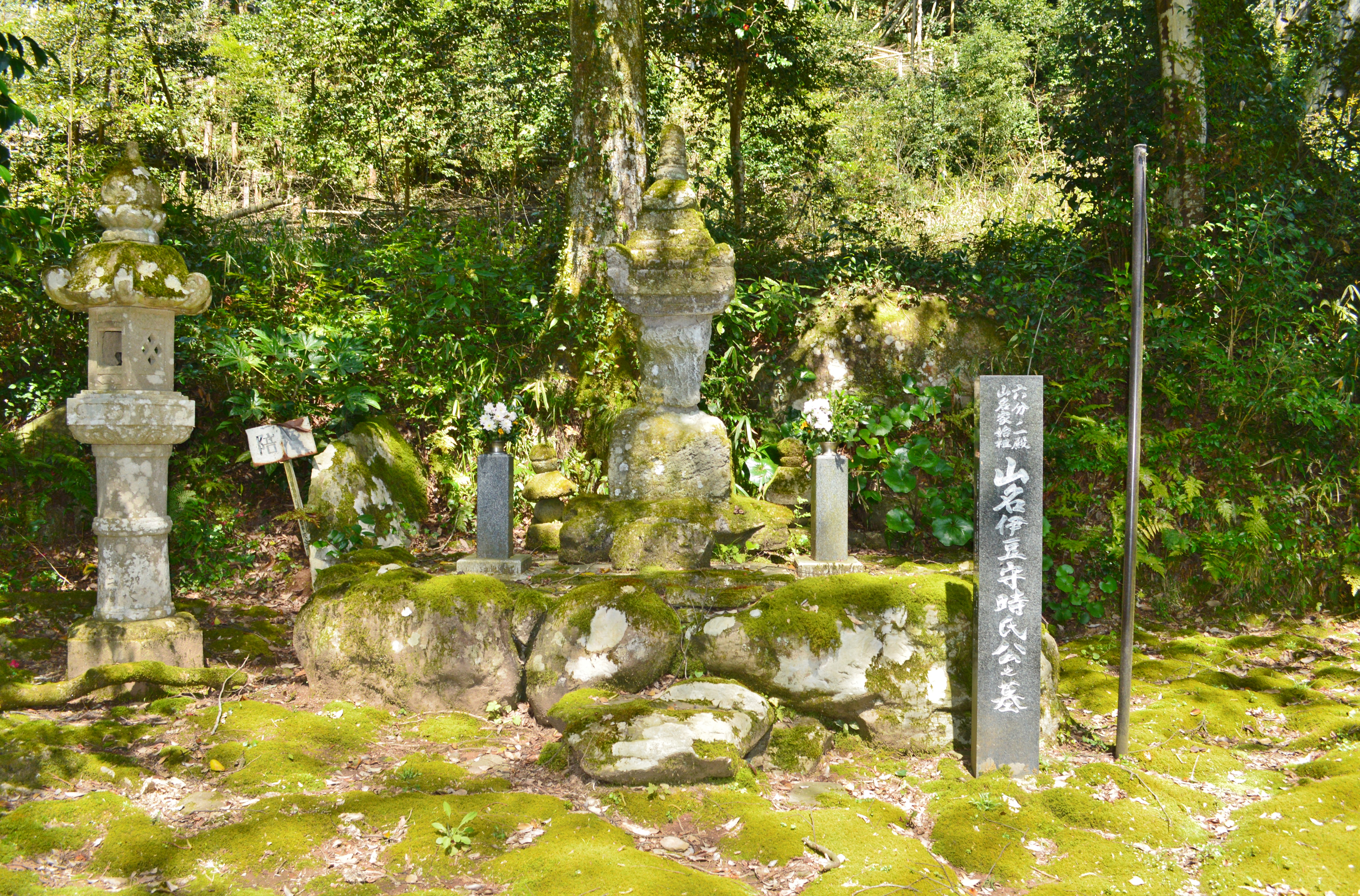 山名寺 山名時氏墓 Nikon D3200